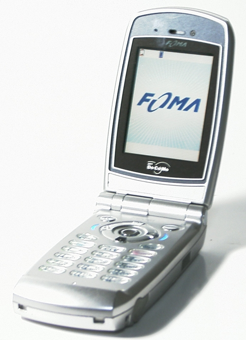 Au_Mobile_Shop_Shinjuku,_Tokyo Japan